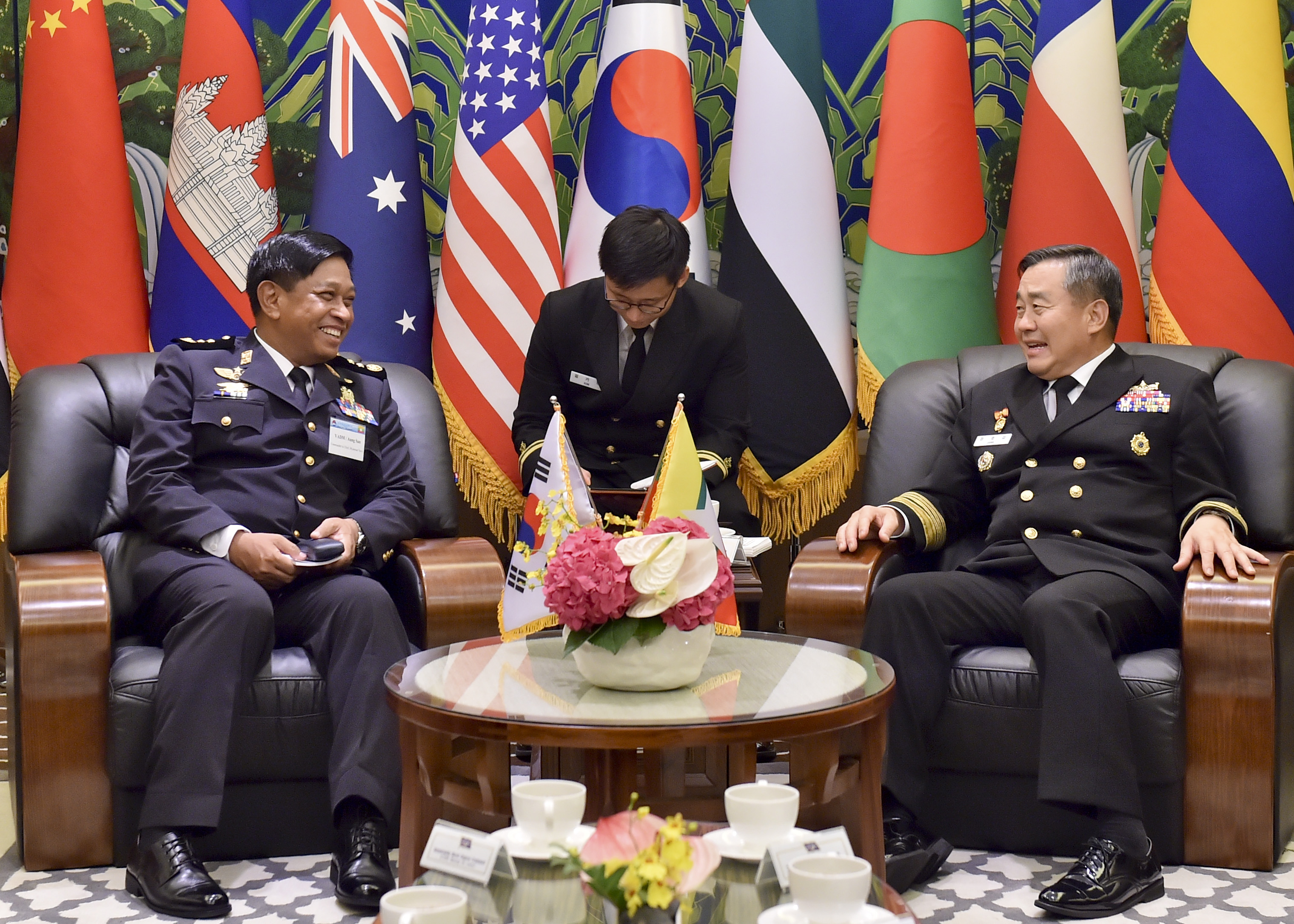 2015부산국제조선해양대제전 국제 해양 방위산업전